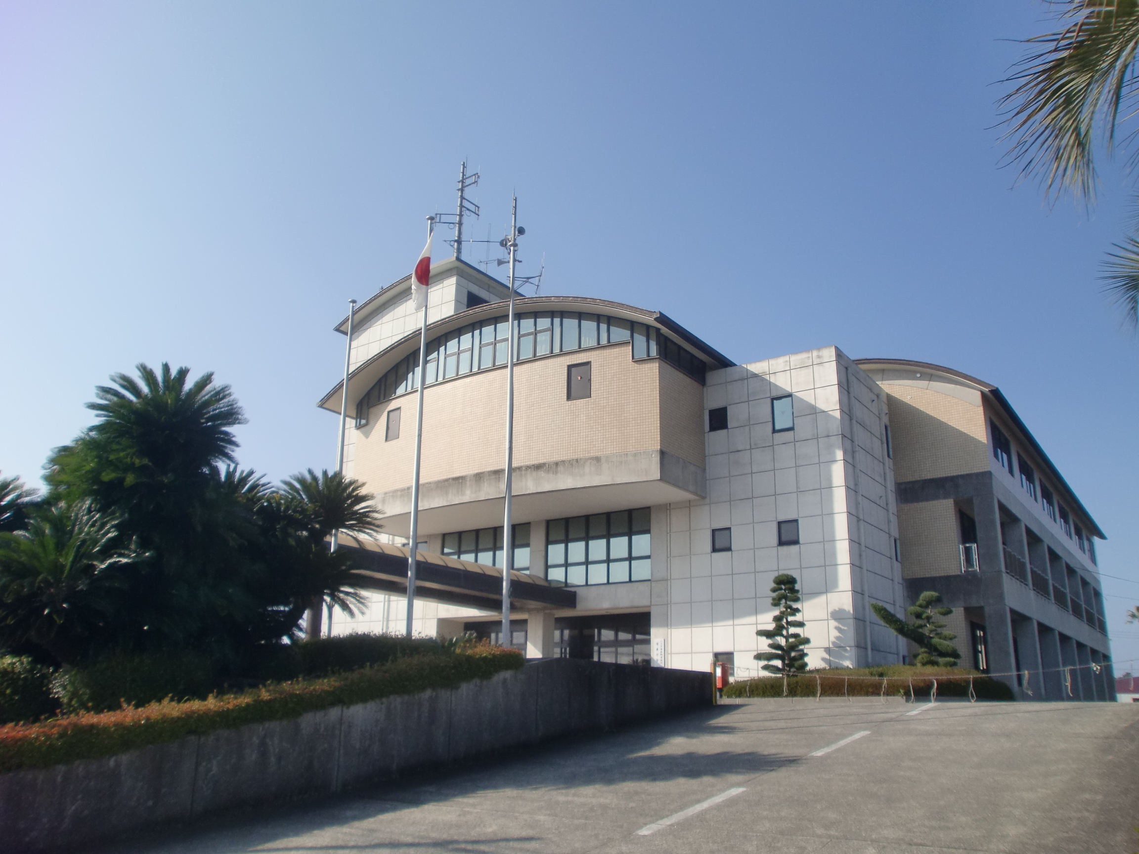 いちき串木野市役所市来支所（旧市来町役場）の外観。